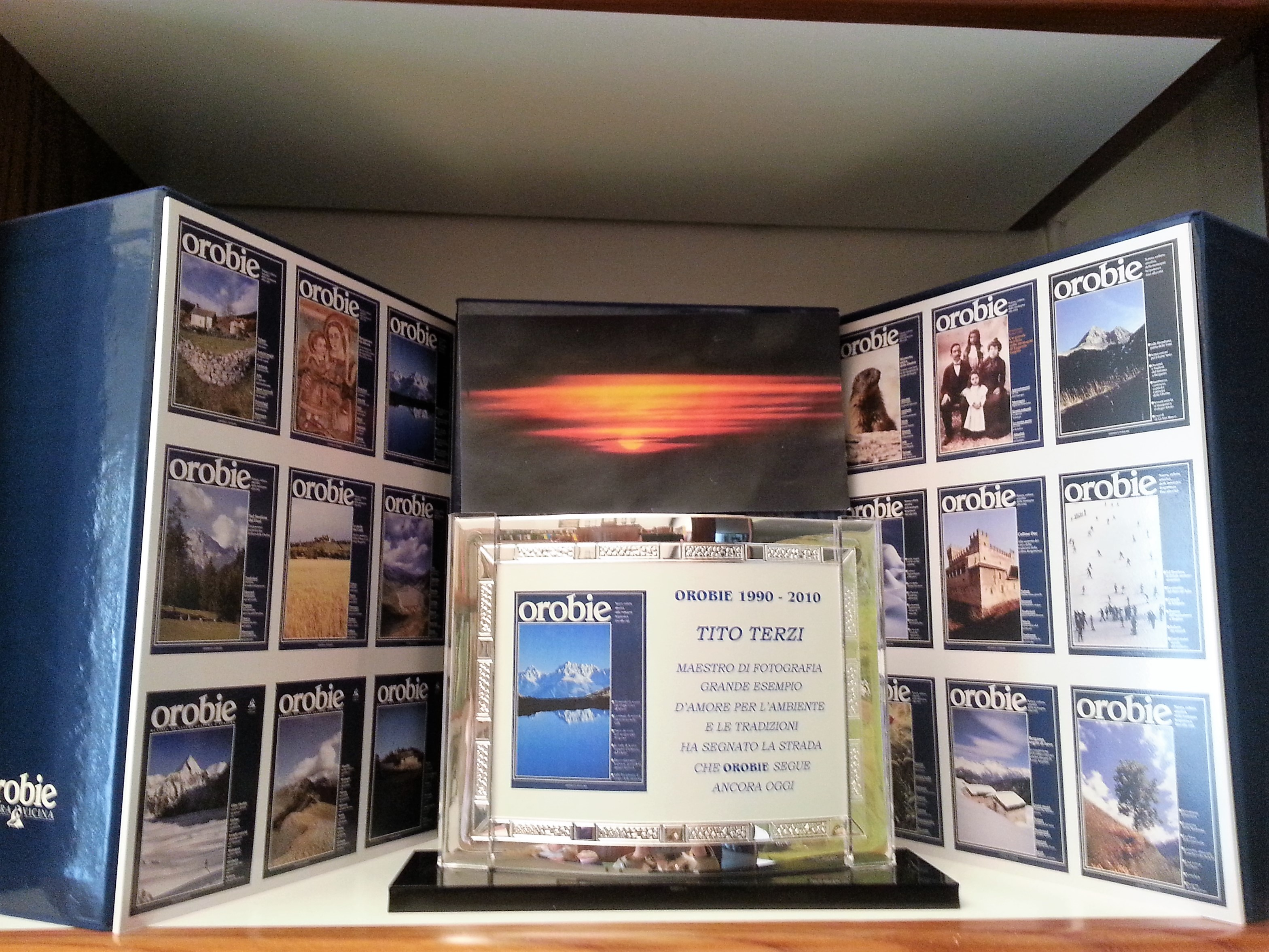 Targa a riconoscenze del lavoro di fotografo